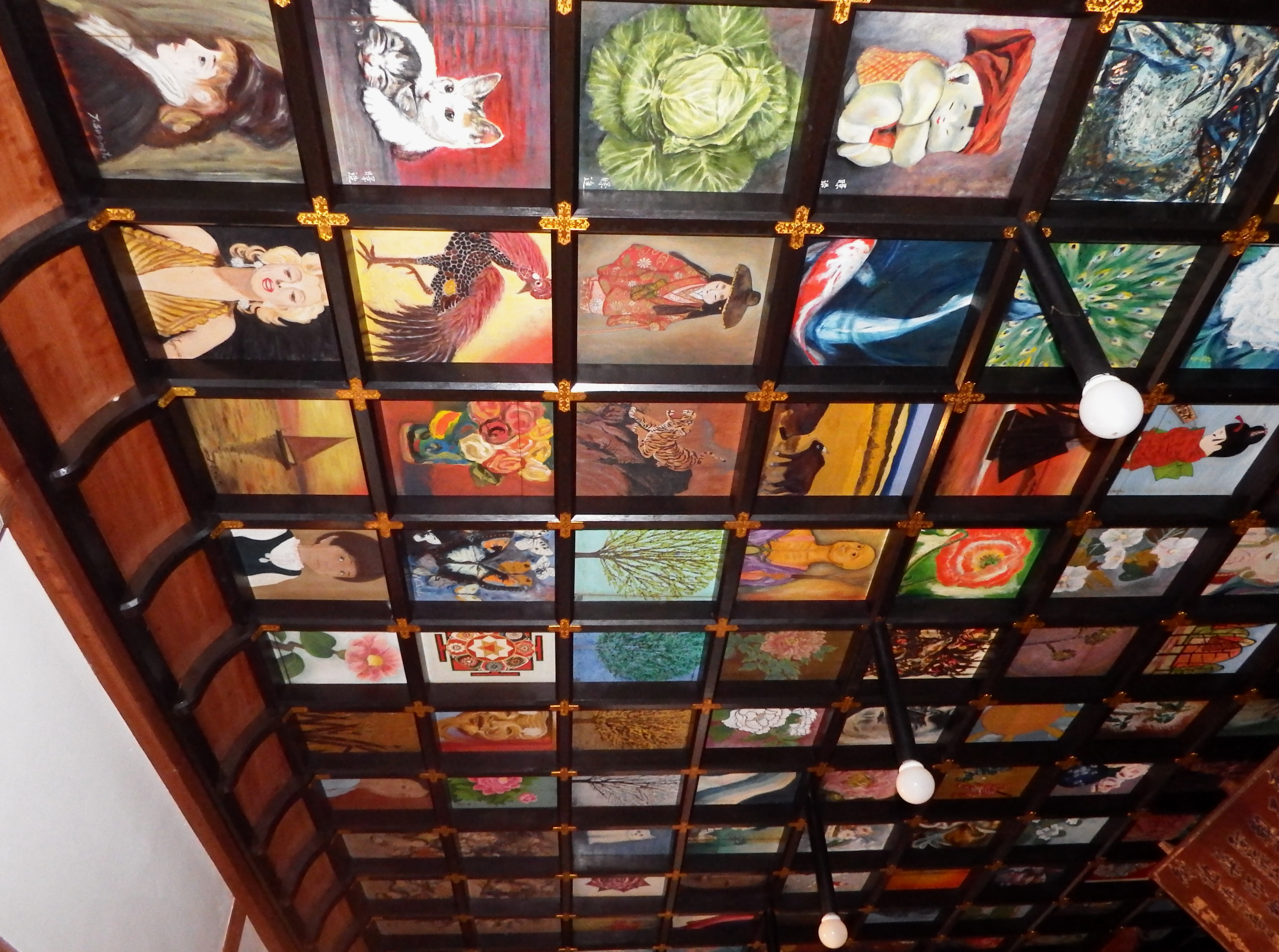 岩本寺の本堂、入口付近の天井絵